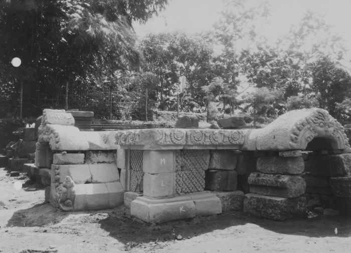 foto. Deel van een Indo-Javaanse tempel bij Karangnongko tijdens de opgraving